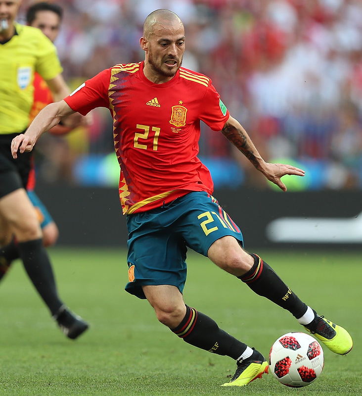 История творится на наших глазах! Россия бьет Испанию в серии пенальти